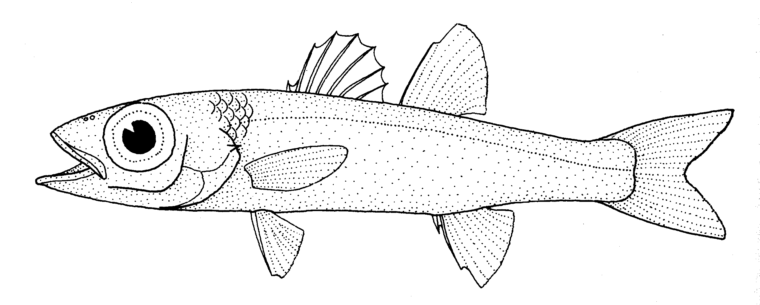 Epigonus telescopus (Bulls-eye)